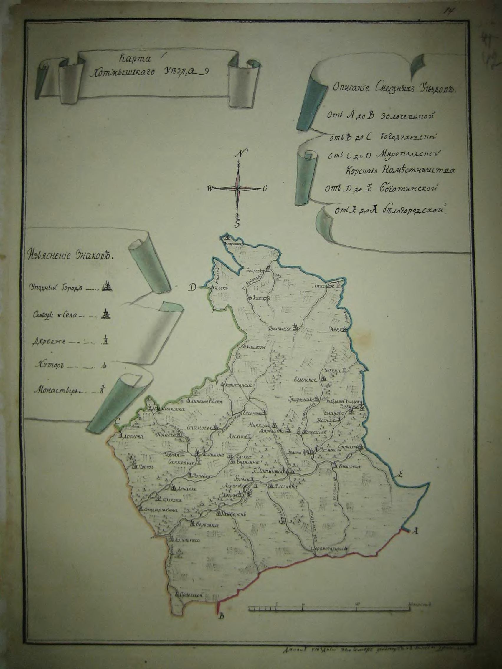 Російська імперія. Харківське намісництво. Мапа Хотмижського повіту з альбому мап Харківського намісництва. 1787 рік.